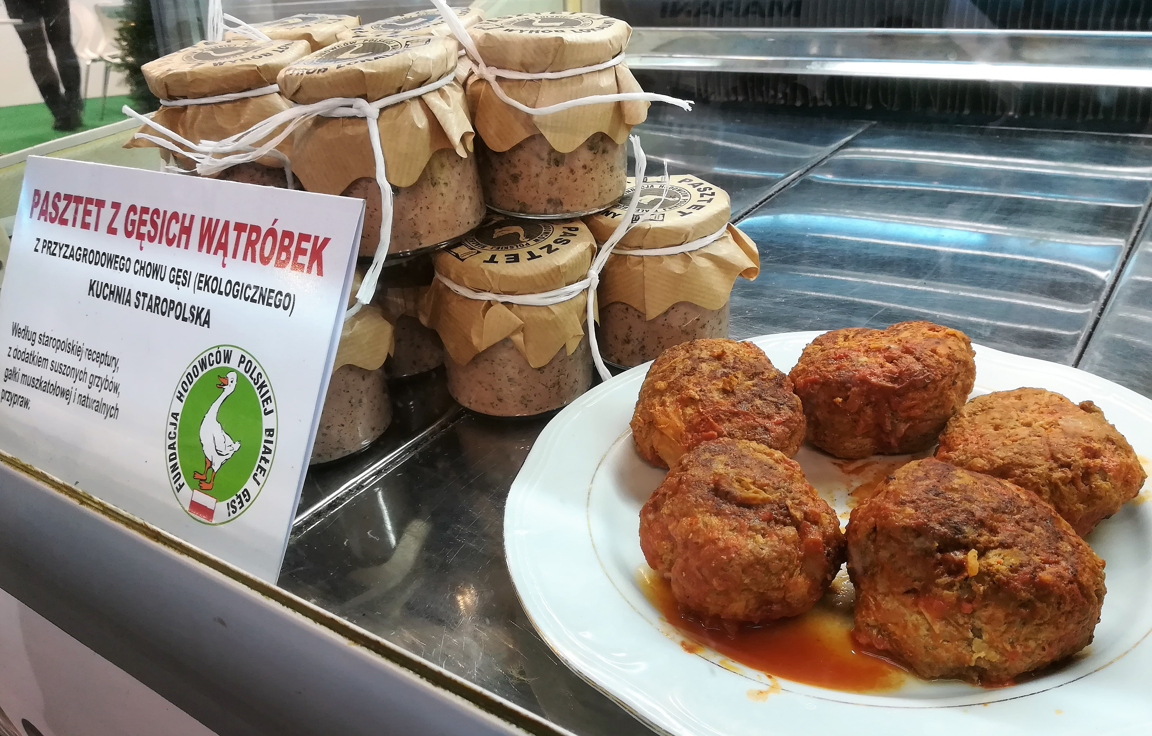 Gęsina na targach Smaki Regionów - Poznań, 2018r.